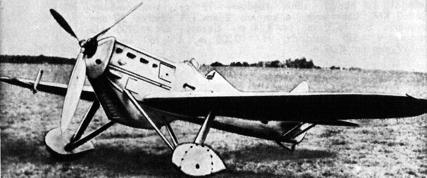 Francuski samolot myśliwski Dewoitine D.510.